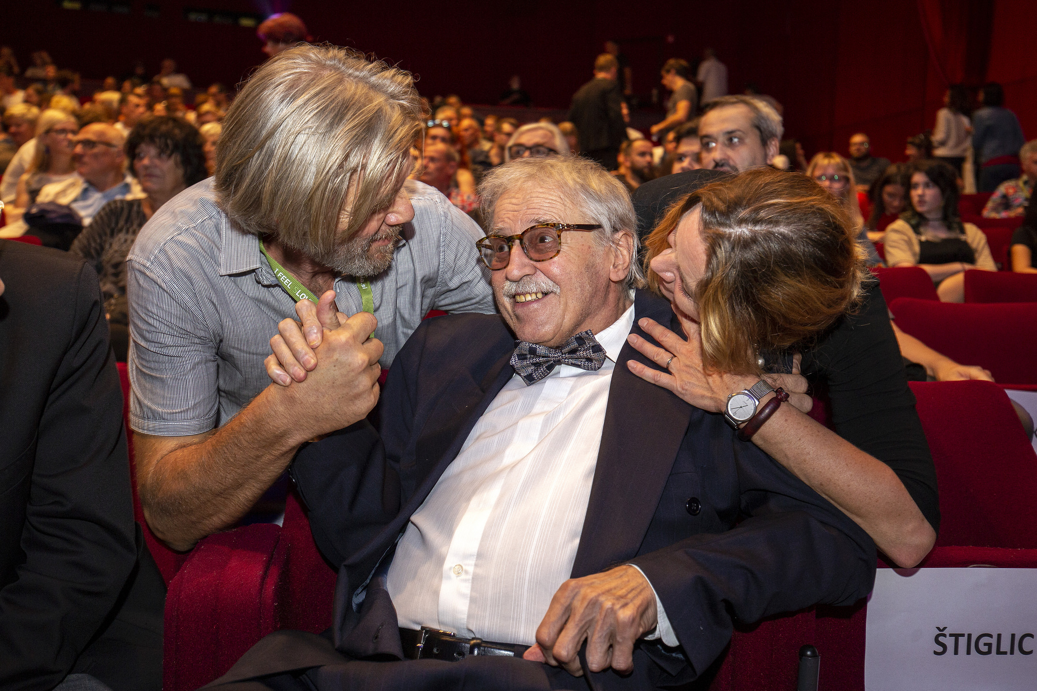 Tugo Štiglic.